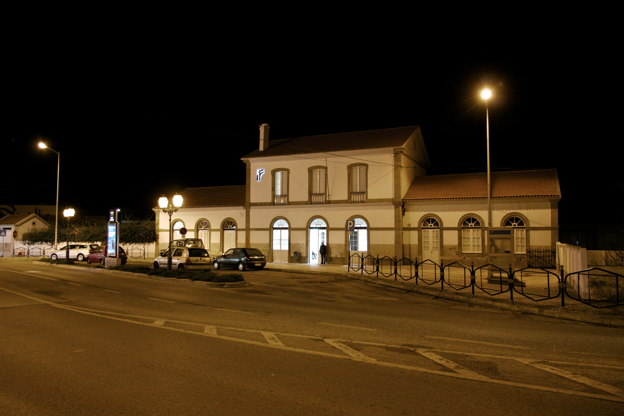 Tipo: E Estação Local: Torres Vedras [Linha do Oeste, PK 64] Data e hora: 3 de Dezembro de 2011 [19h43]